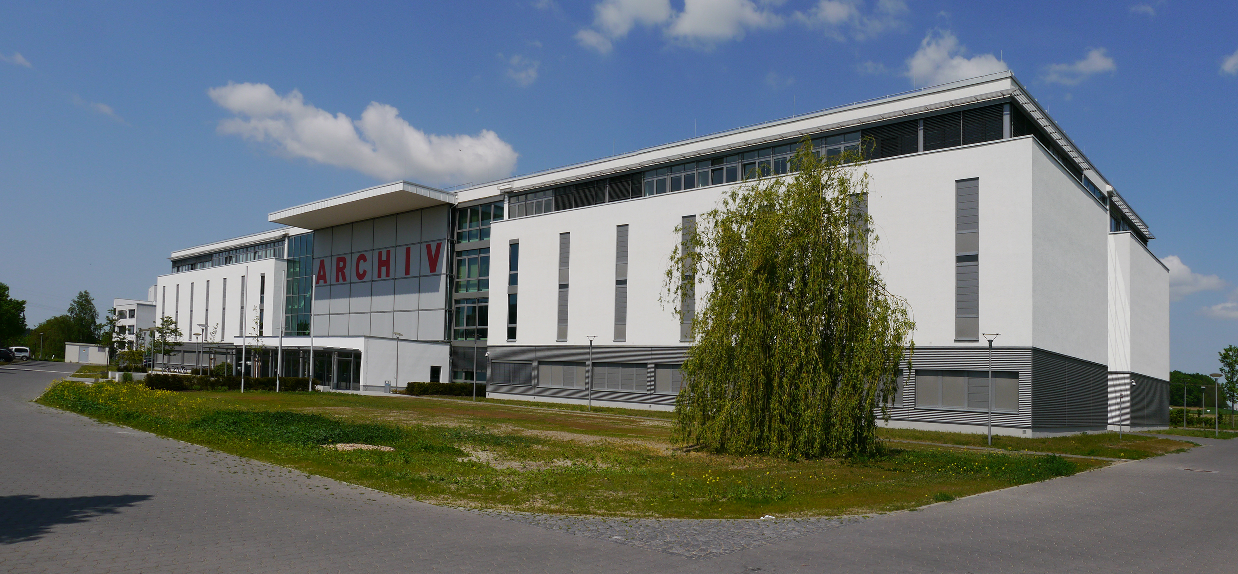 Brandenburgisches Landeshauptarchiv (BLHA) in Golm